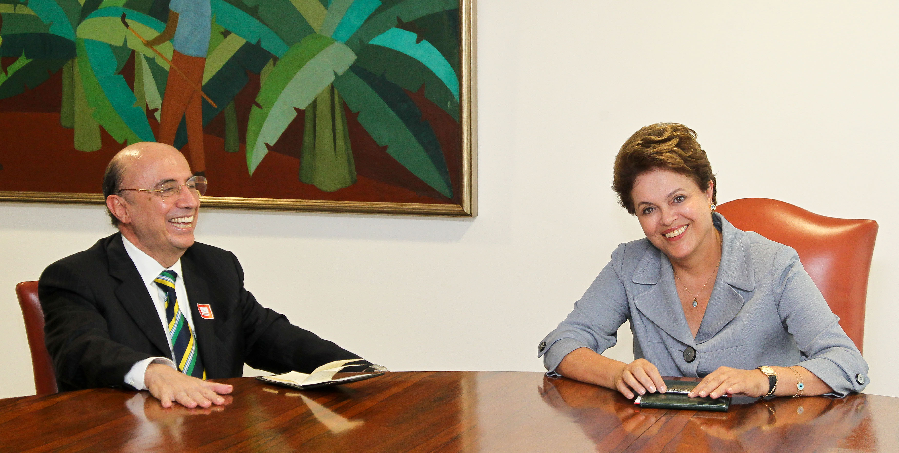 Brasilia - DF, 14/03/2011. Presidenta Dilma Rousseff com Henrique Meirelles. Foto: Roberto Stuckert Filho/PR.